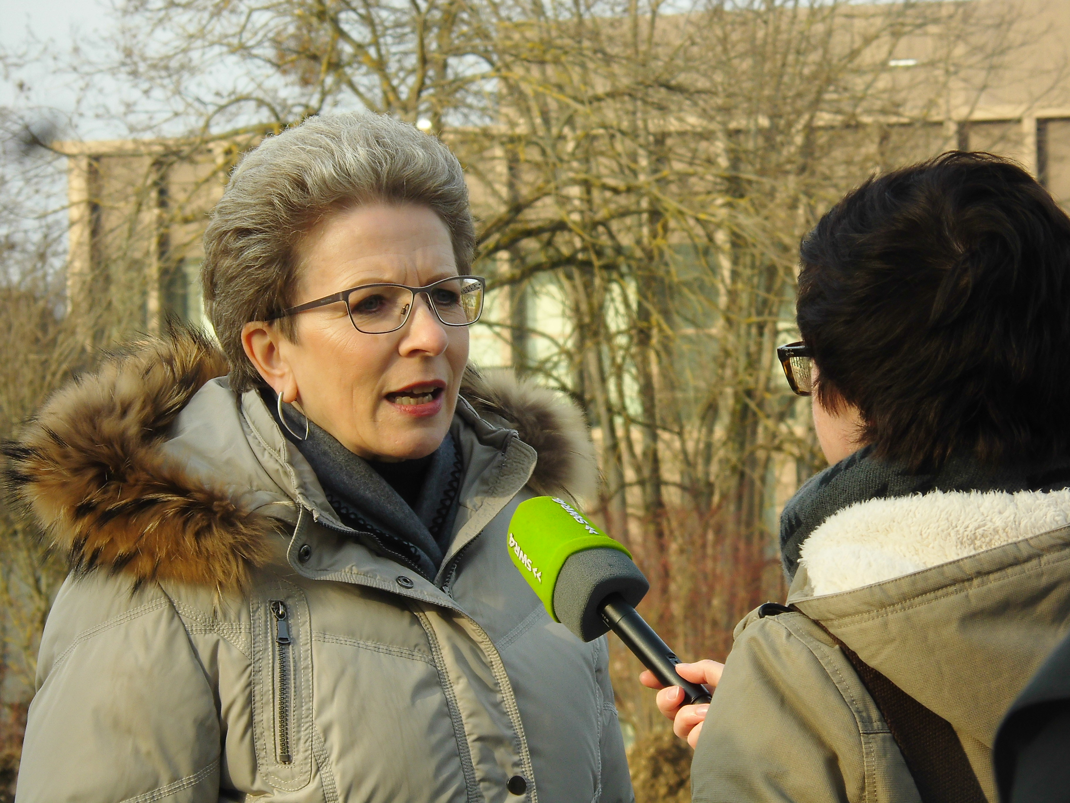 Oberbürgermeisterin Barbara Bosch am 1. März nach dem Spatenstich für den Theaterneubau "Die Tonne"